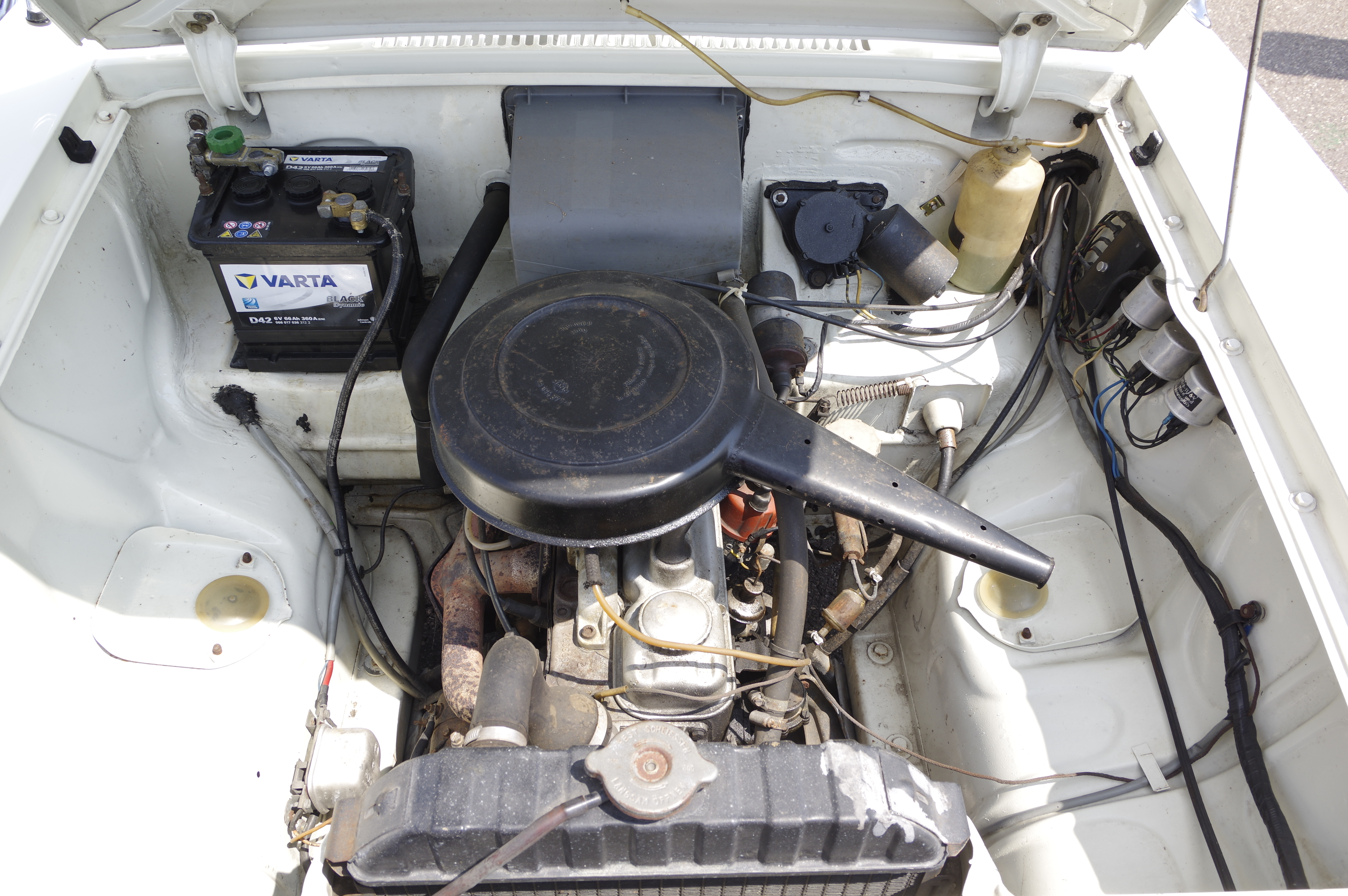 Opel Kadett A Caravan, 1963, 40 PS; 34. Int. Konzer Old- und Youngtimertreffen